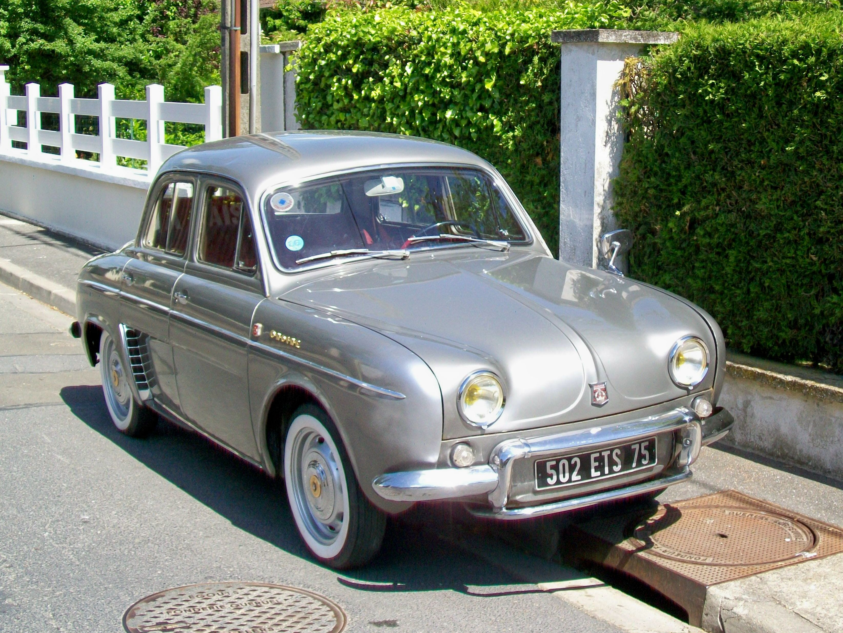 Renault Ondine remarquablement restaurée, garée dans une rue de Chaumontel (95).